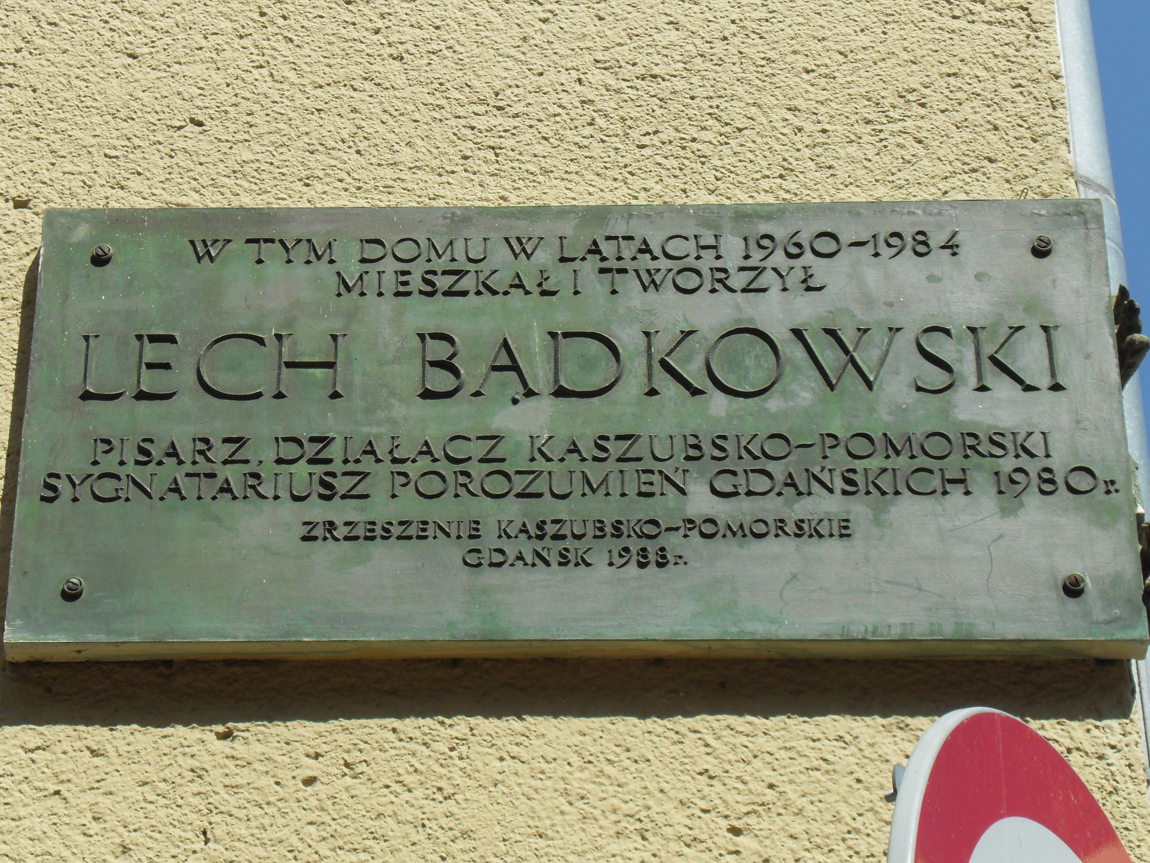 Gdańsk, Targ Rybny 6. Lech Bądkowski - tablica pamiątkowa.